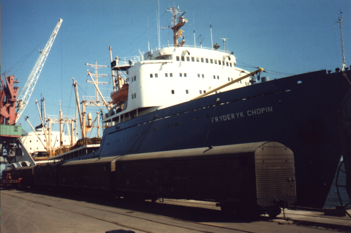 Fryderyk Chopin Paljassaare sadamas Tallinnas